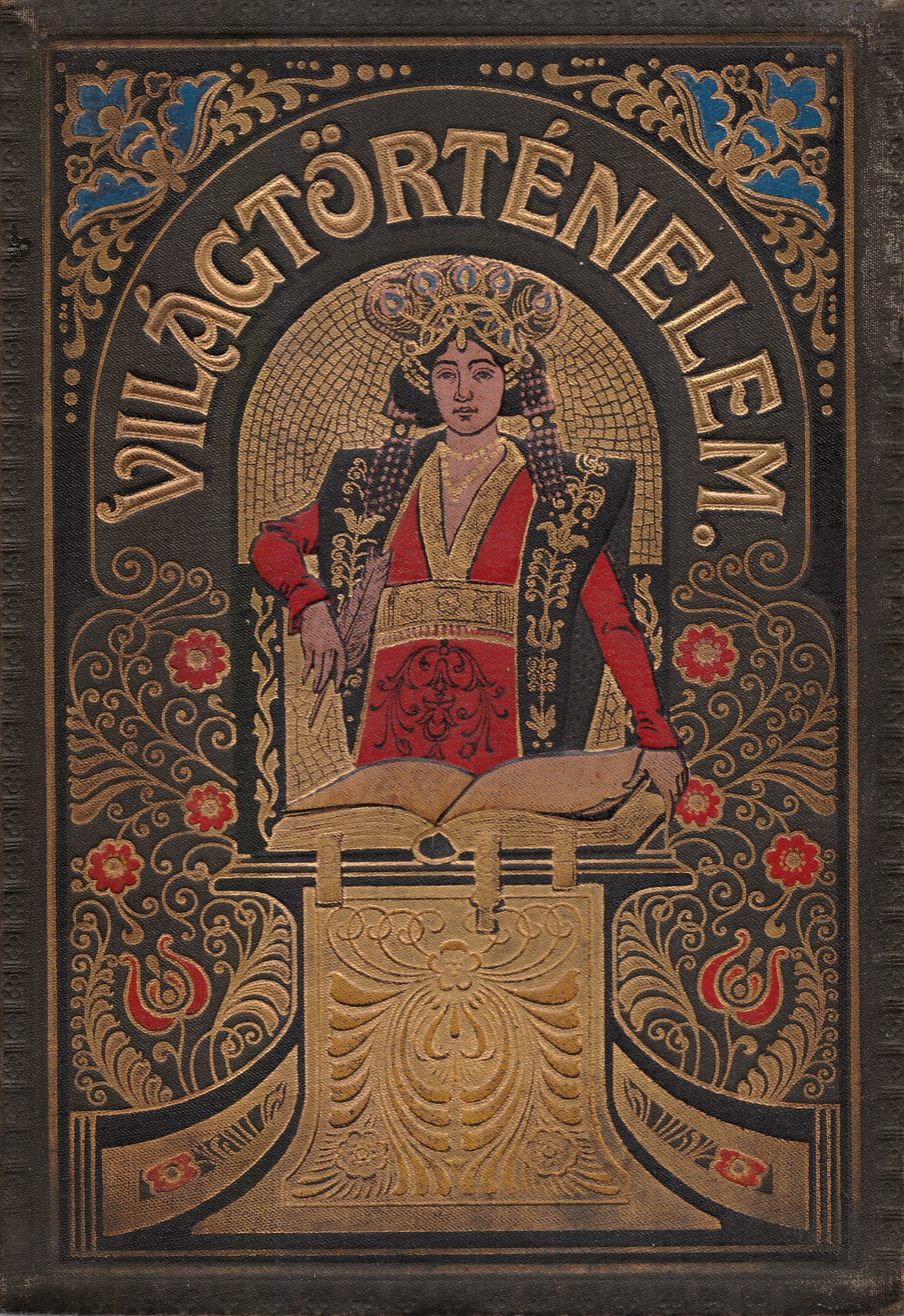 Tolnai Világtörténelme (1908-1912), szerk.: Mangold Lajos (1850-1912) és Horváth Cirill József (1865-1941). Saját készítésű kép.